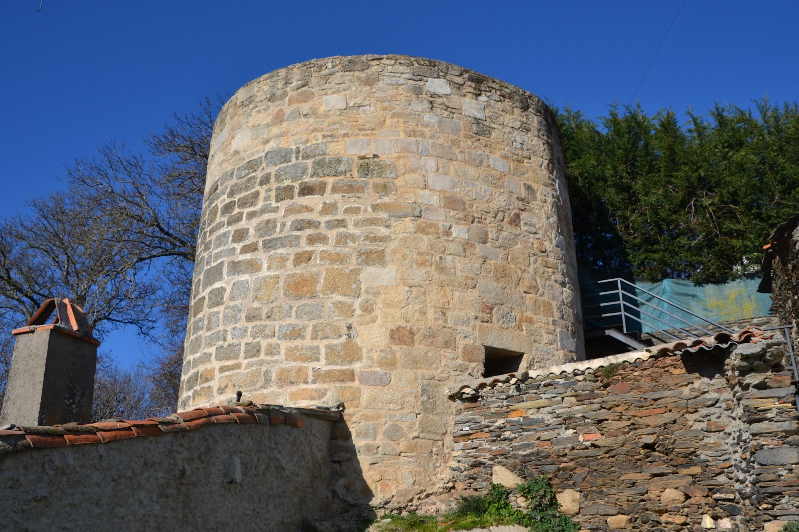 Una de las torres del castillo de Alcañices